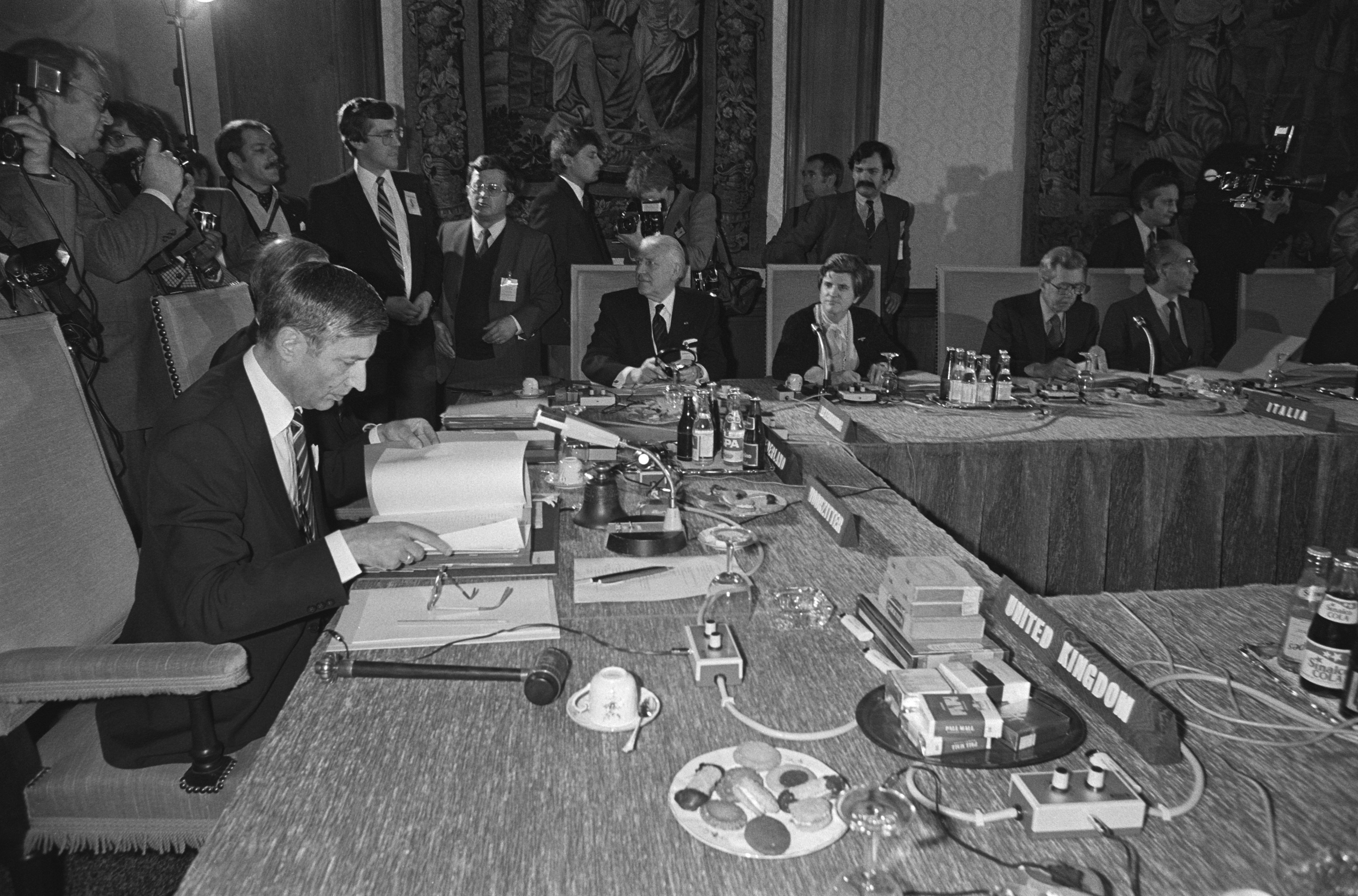 Collectie / Archief : Fotocollectie Anefo Reportage / Serie : [ onbekend ] Beschrijving : Europese Raad in Maastricht, 27a Van Agt e.a. tijdens conferentie, 28a en 29a overzicht tijdens conferentie met links Thatcher Datum : 23 maart 1981 Locatie : Maastricht Trefwoorden : conferenties Fotograaf : Croes, Rob C. / Anefo Auteursrechthebbende : Nationaal Archief Materiaalsoort : Negatief (zwart/wit) Nummer archiefinventaris : bekijk toegang 2.24.01.05 Bestanddeelnummer : 931-3910